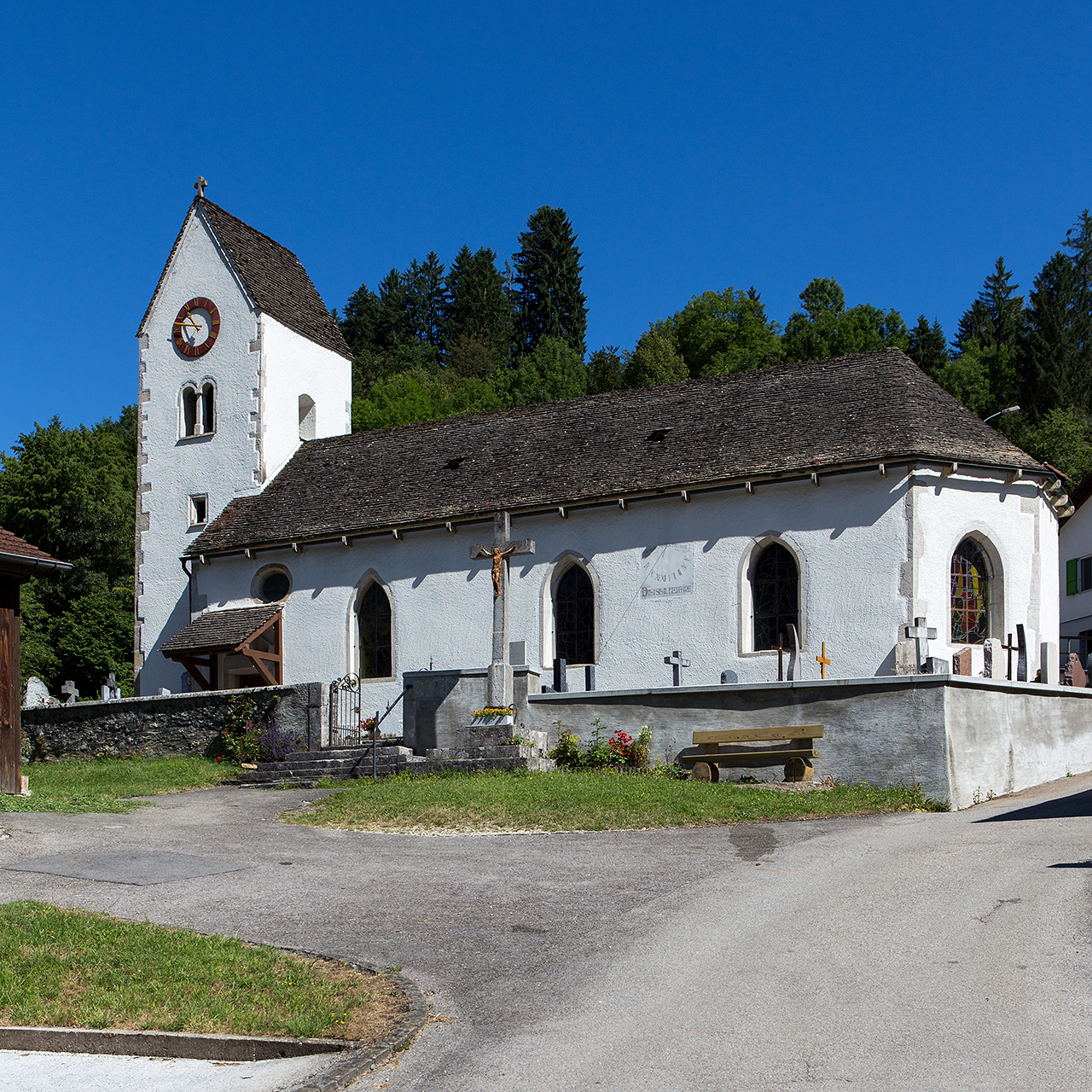 Die Kirche von Soubey (JU) mit Glasfenstern des Malers Goghuf